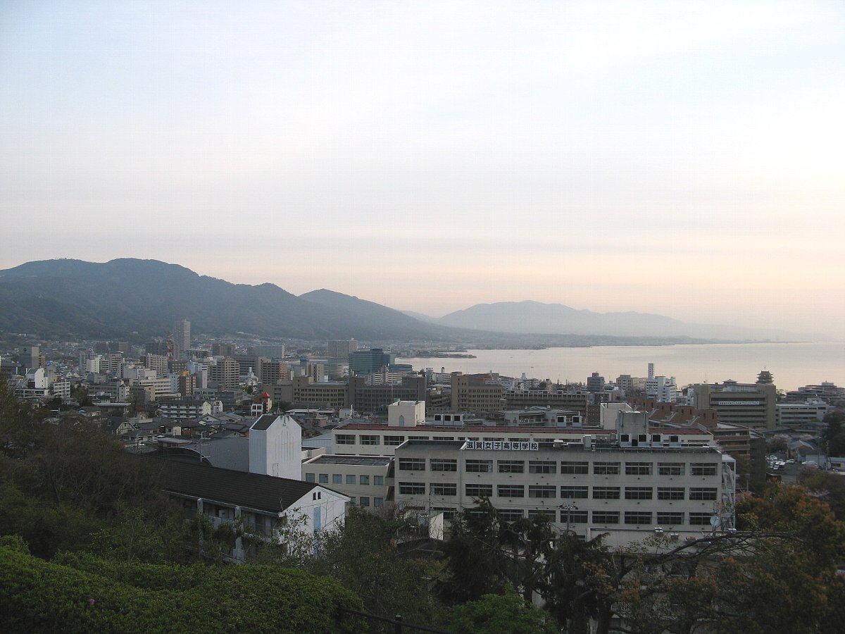 夜明けの大津市街 大津SAから望む